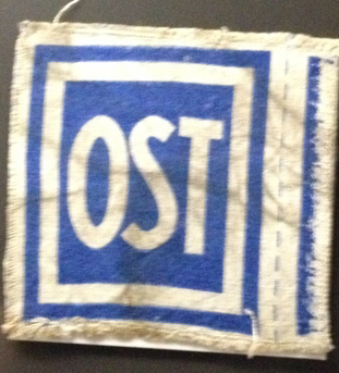 Aufnäher für Ostarbeiter im zweiten Weltkrieg